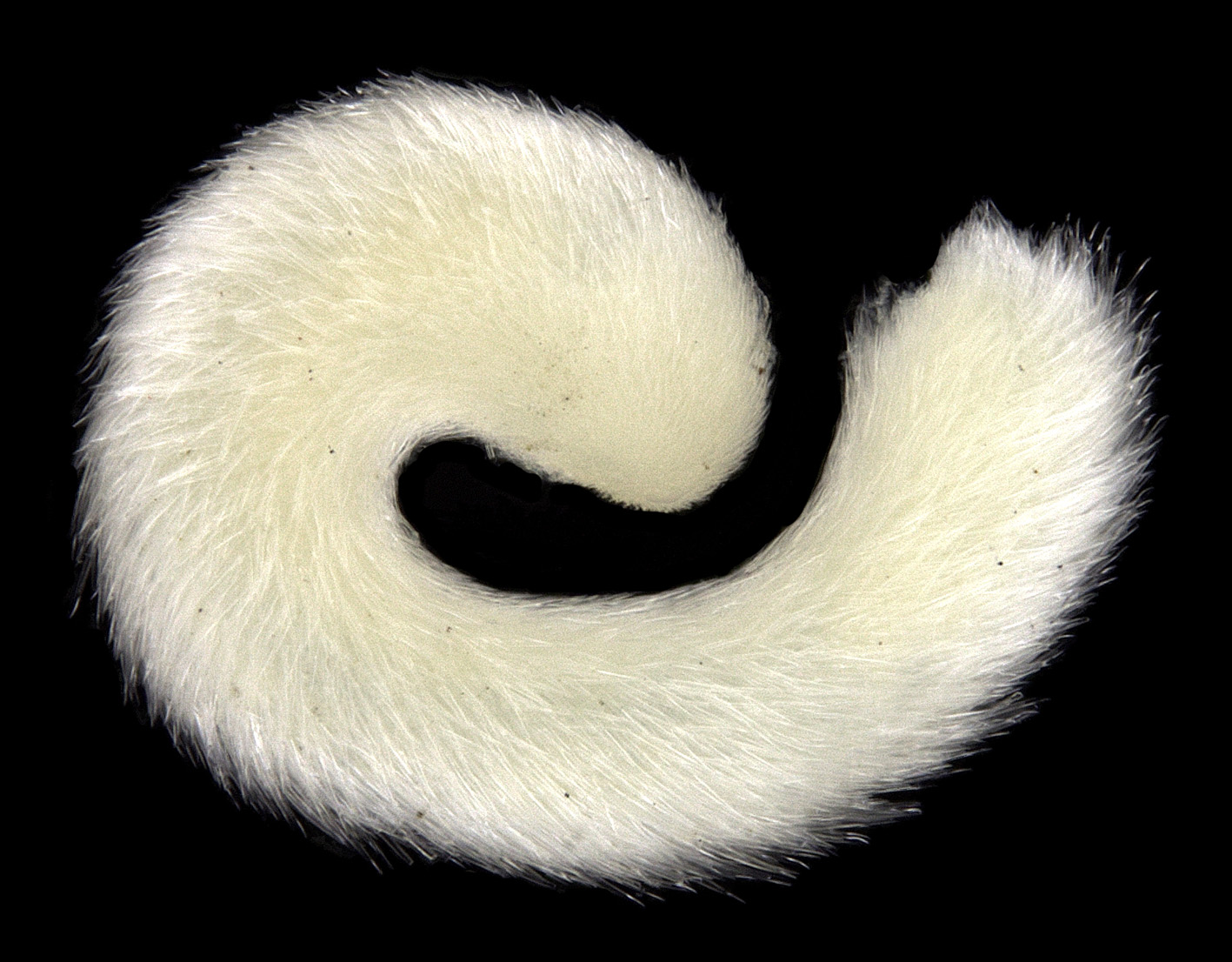 Amboherpia heterotecta